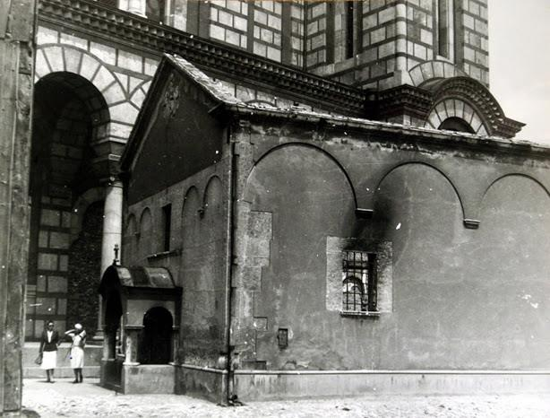 Фотографије бомбардованог Београда 06. 04. 1941. и улазак окупатора у Београд априла 1941.